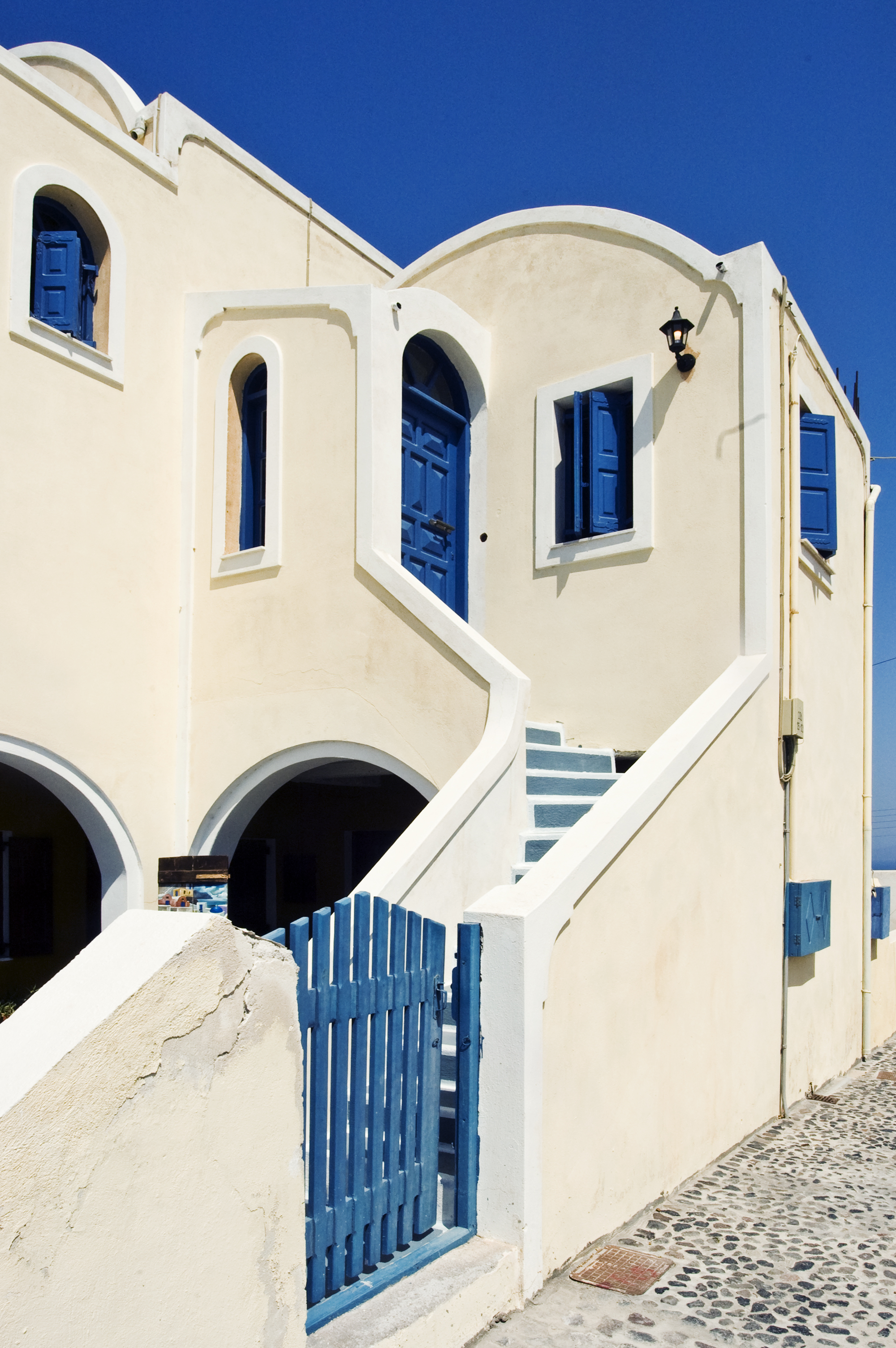 Oia, Santorini